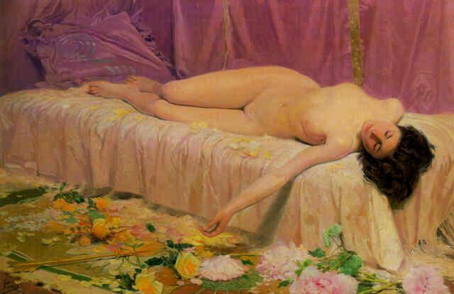 Flor deshecha, 1906, desnudo pintado por Antonio Fillol Granell.